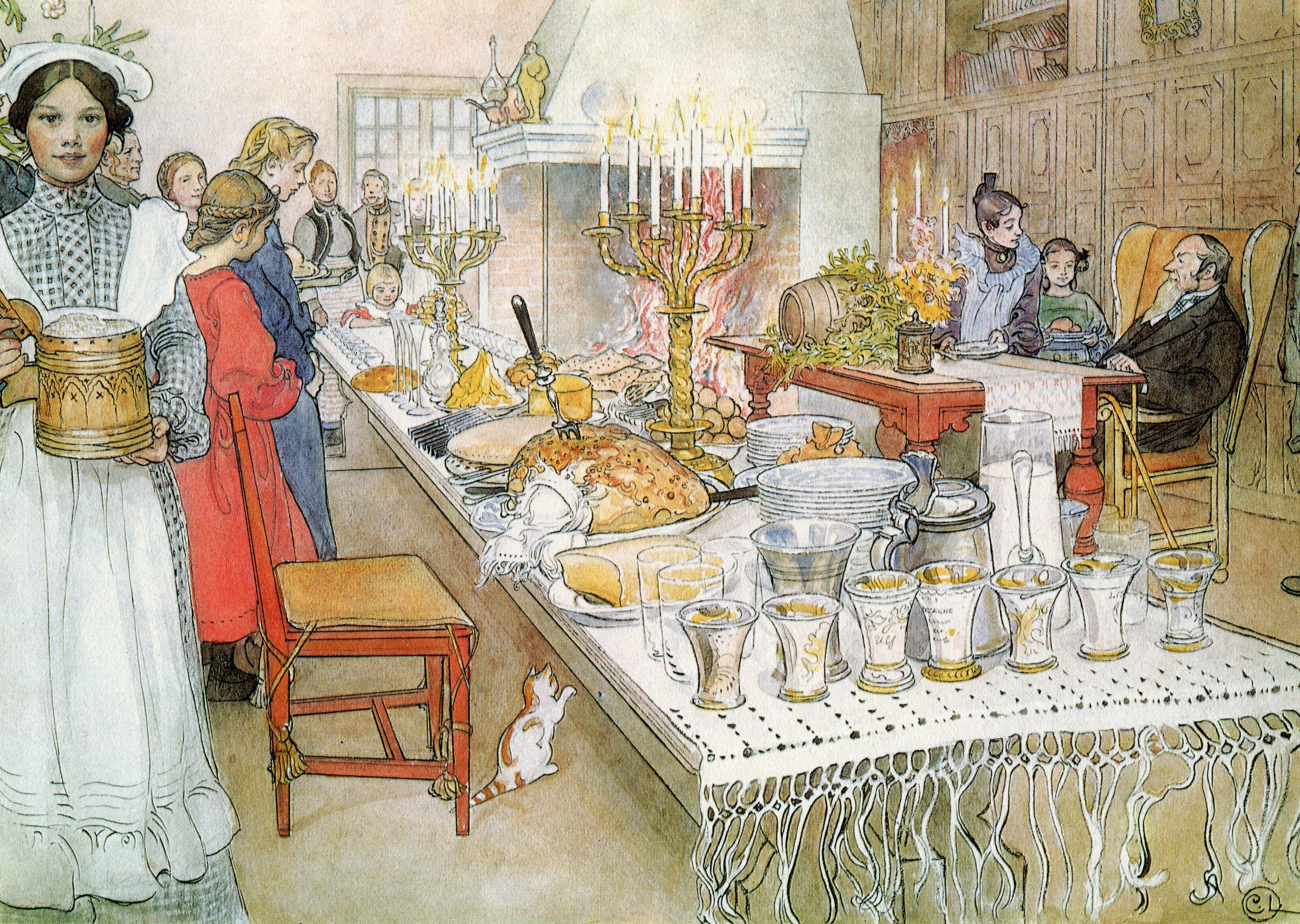 "Julaftonen", akvarell från 1904 av Carl Larsson.